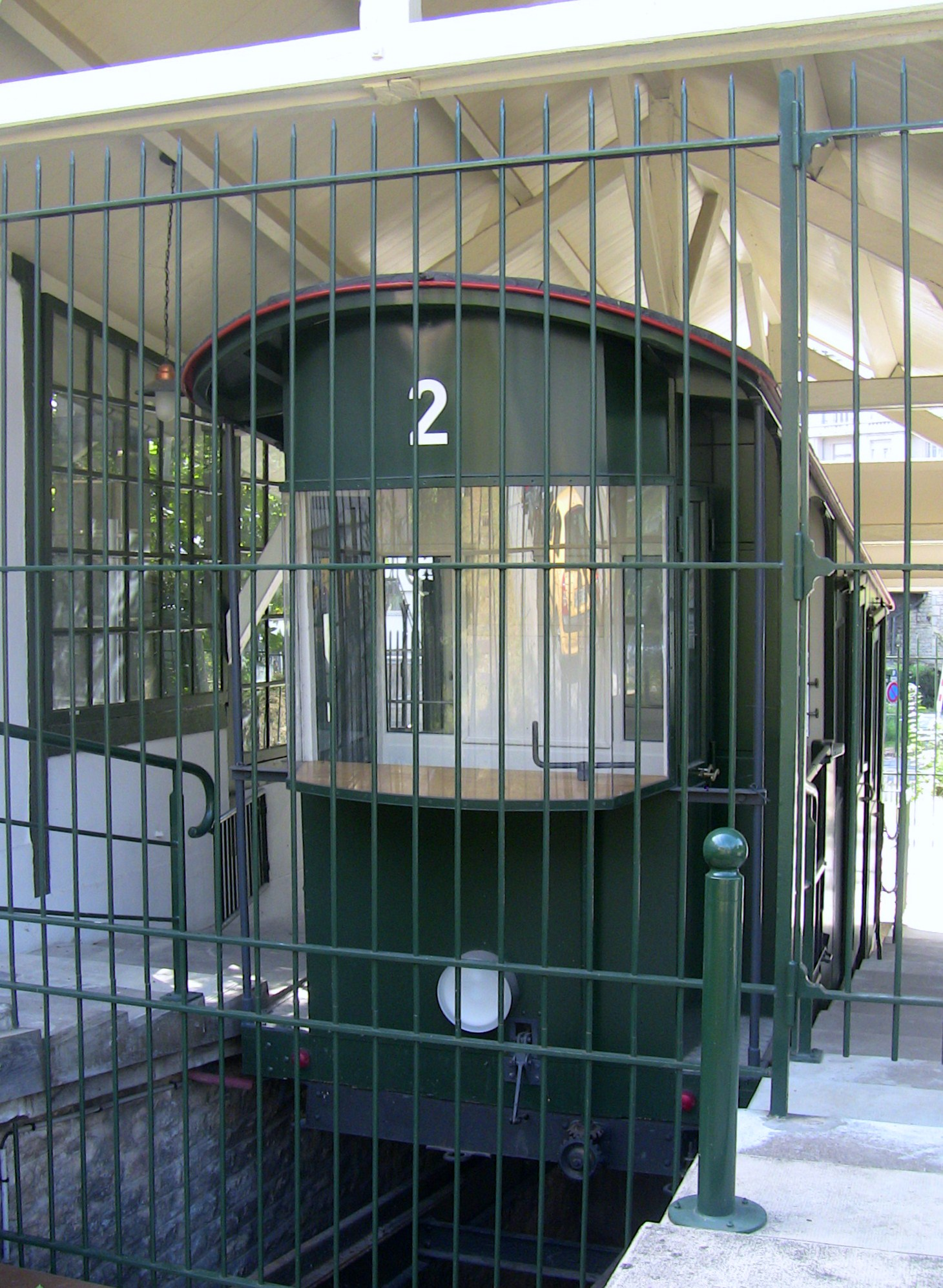 Une voiture du funiculaire de Bregille à Besançon (Doubs, France).